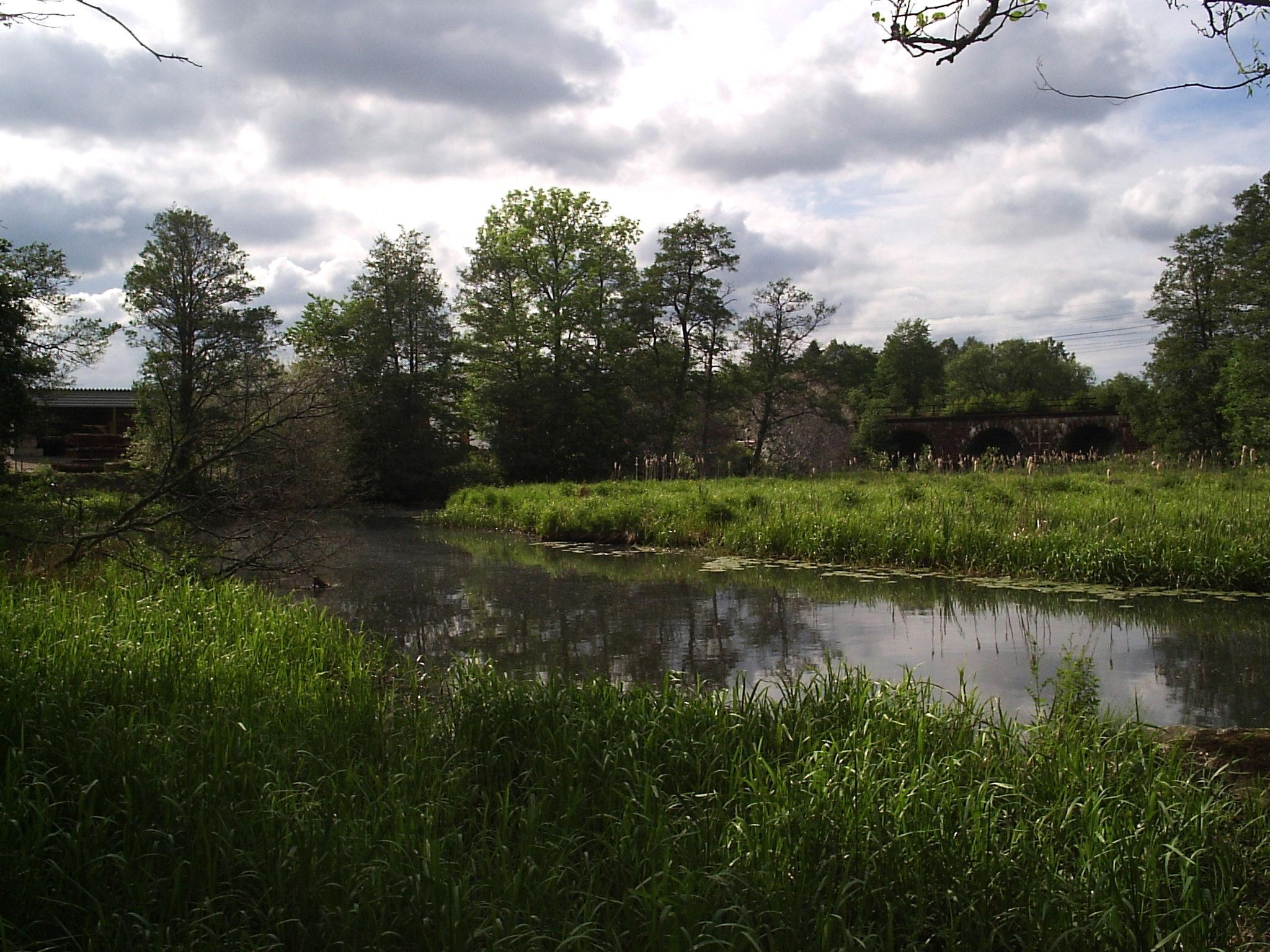 Ån Nossan i Herrljunga